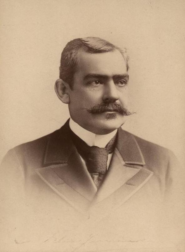 Elías Fernández Albano (Santiago; 1845- 6 de septiembre de 1910). Abogado y político chileno, vicepresidente de Chile en 1910.